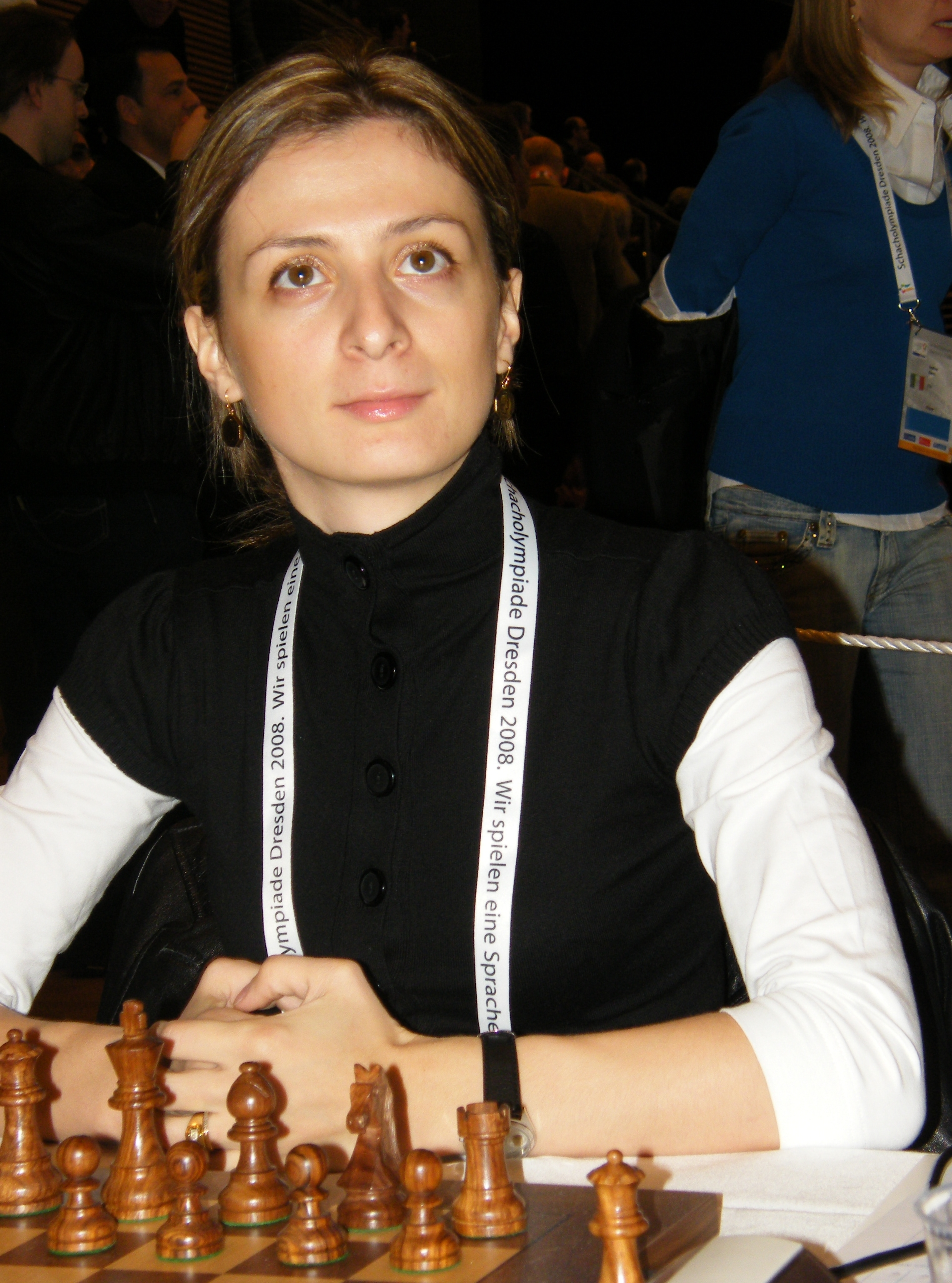 Rusudan Goletiani bei der 38. Schacholympiade in Dresden 2008